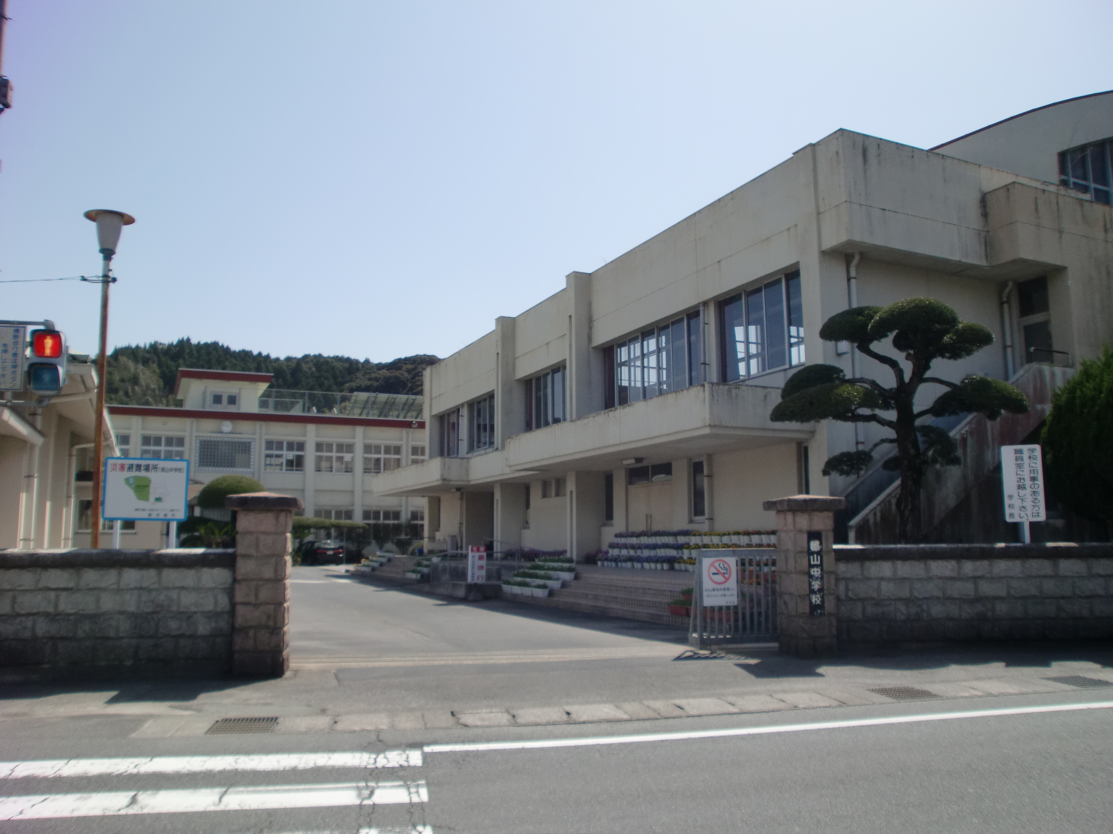 鹿児島市立郡山中学校の外観。